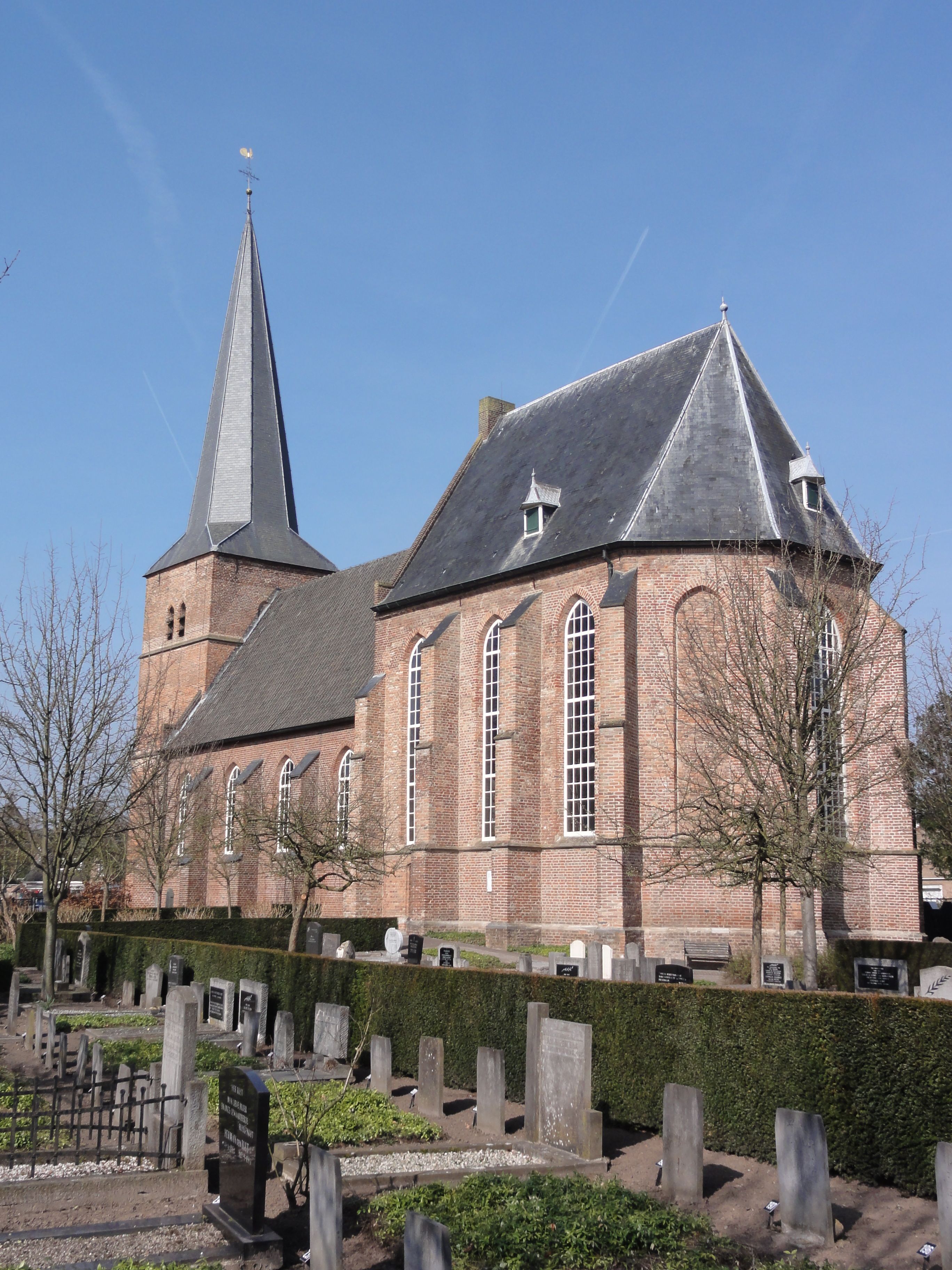 Hervormde kerk van Groesbeek, Gelderland NL